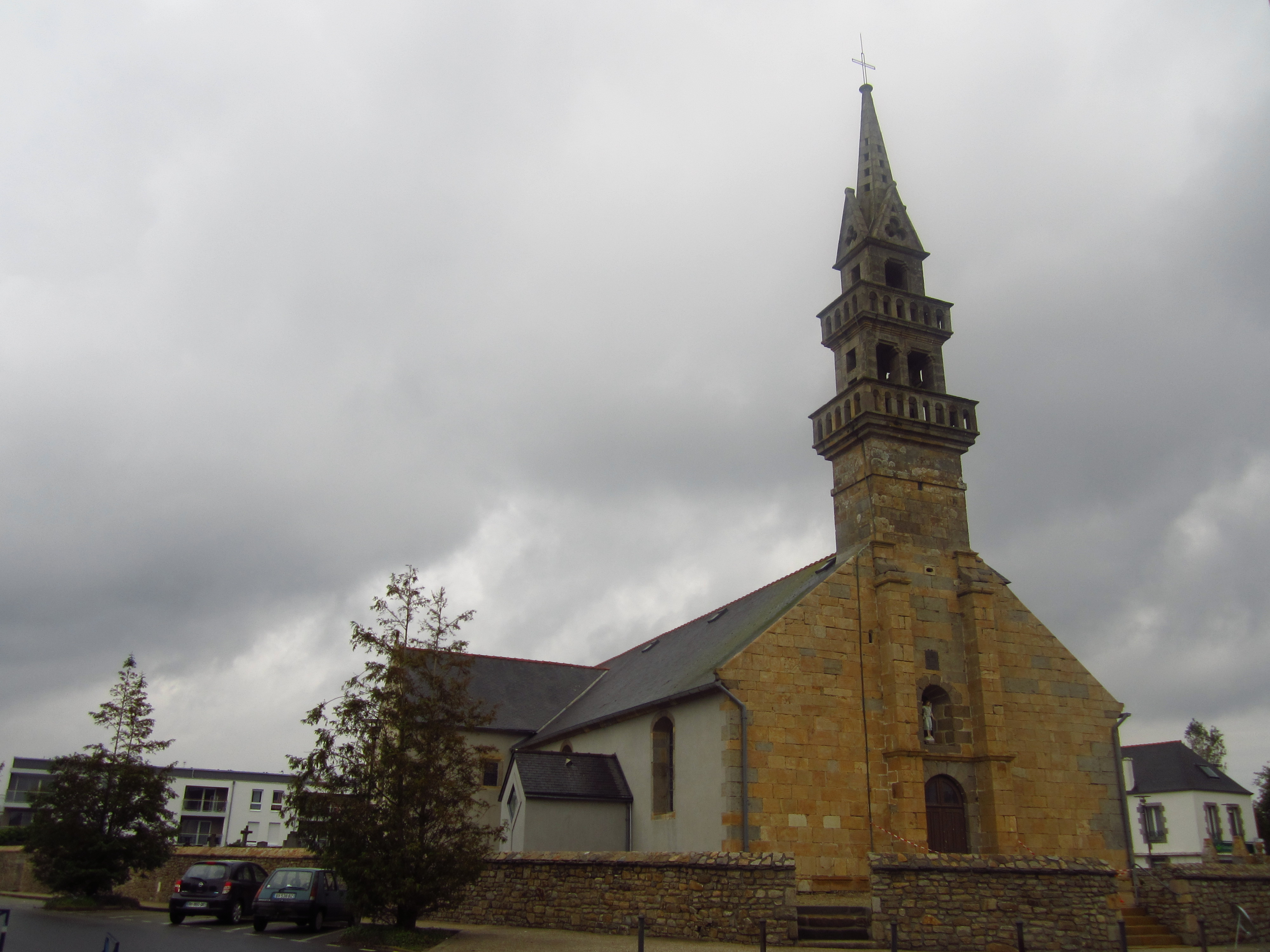 L'église Saint-Valentin à Guilers dans le Finistère